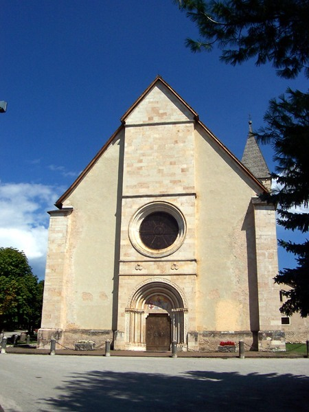 Sanzeno - Basilica dei Ss. Martiri dell'Anaunia